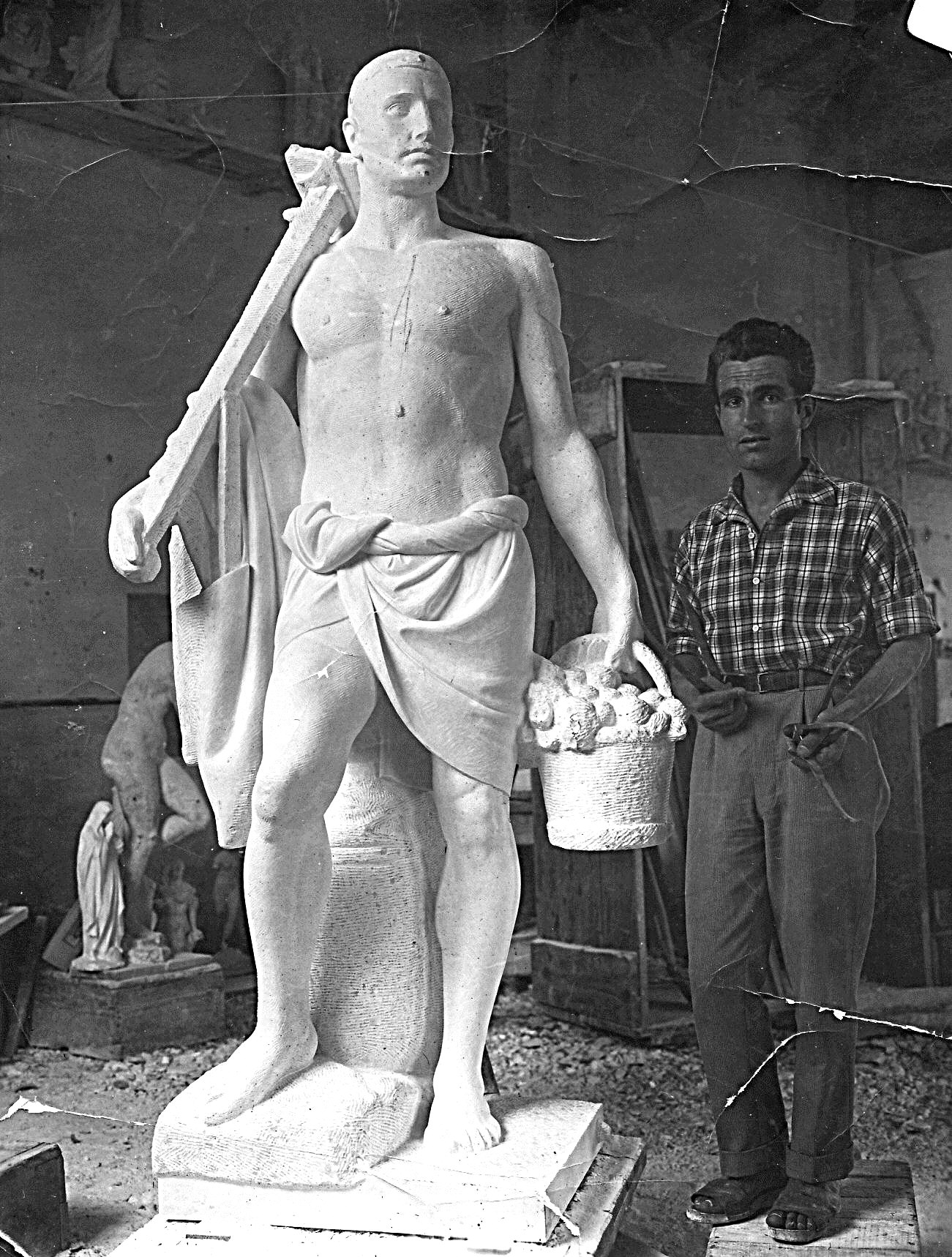 cardini giulio, all'età di circa 20 anni accanto ad una scultura appena realizzata